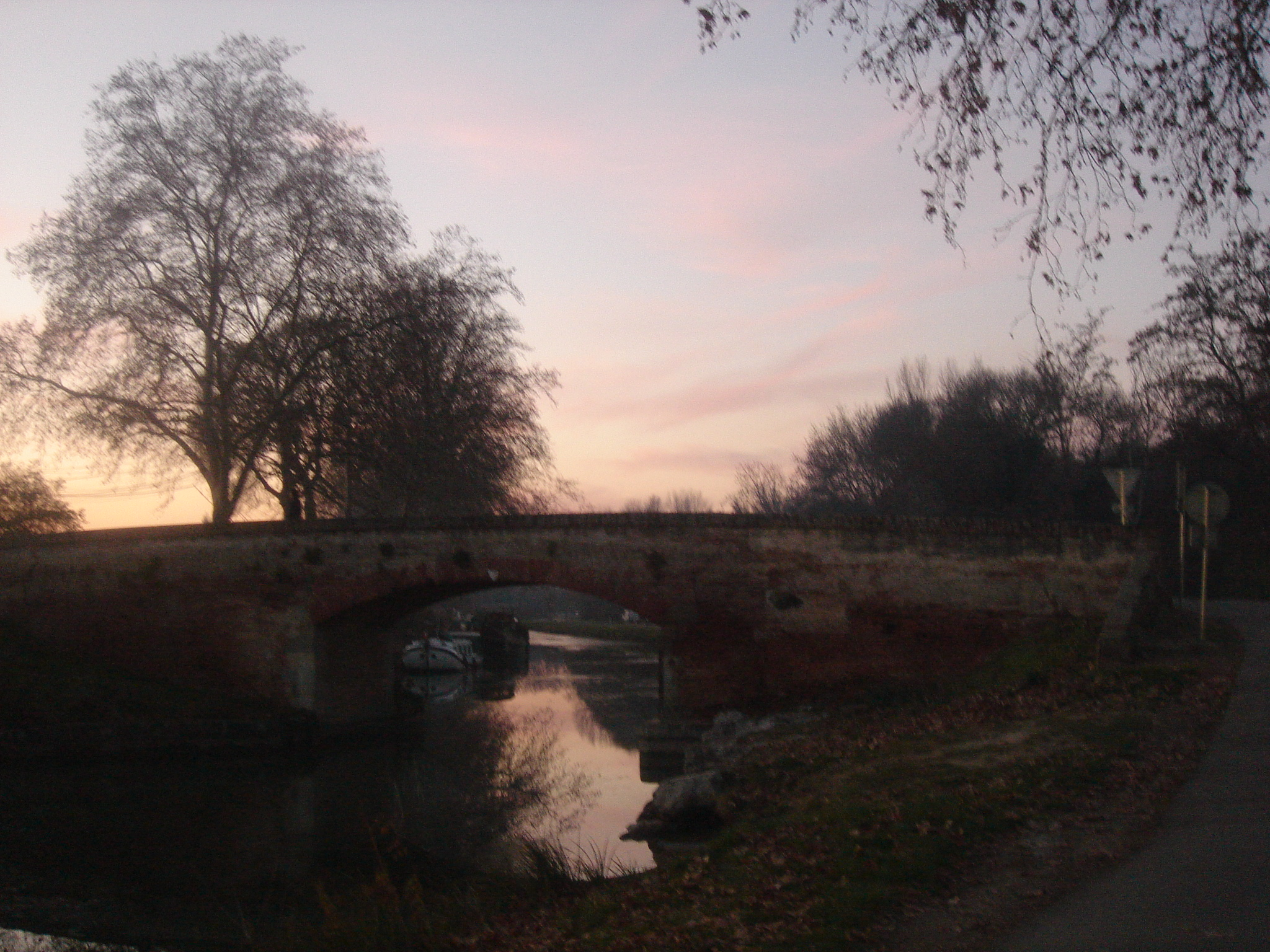 Pont de mange-pommes (Ramonville Saint-Agne), canal du Midi